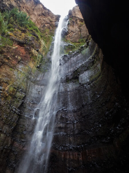 cascata